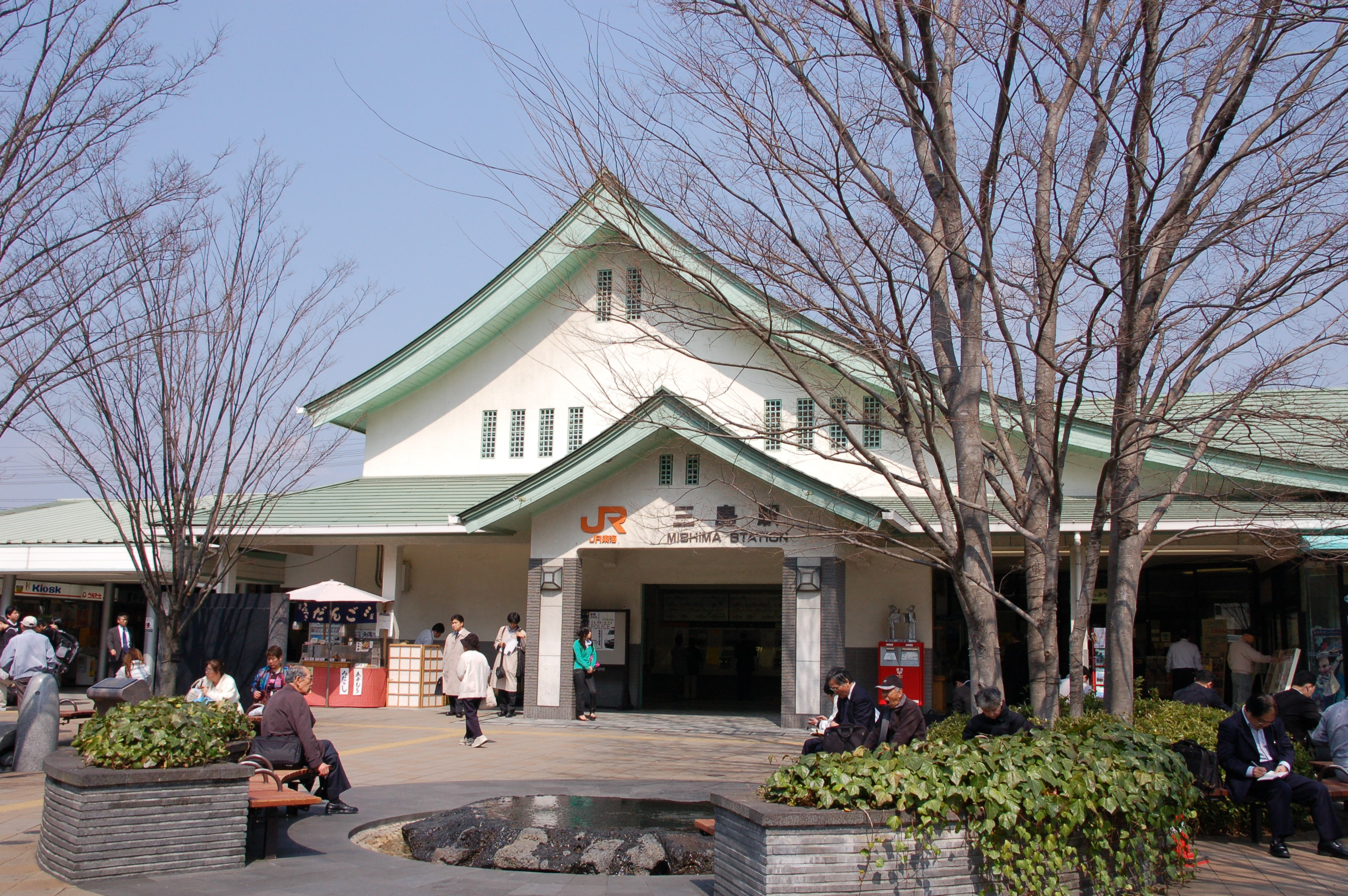 三島駅本屋（静岡県三島市） 撮影日 2007年3月23日 撮影者 S-yamada